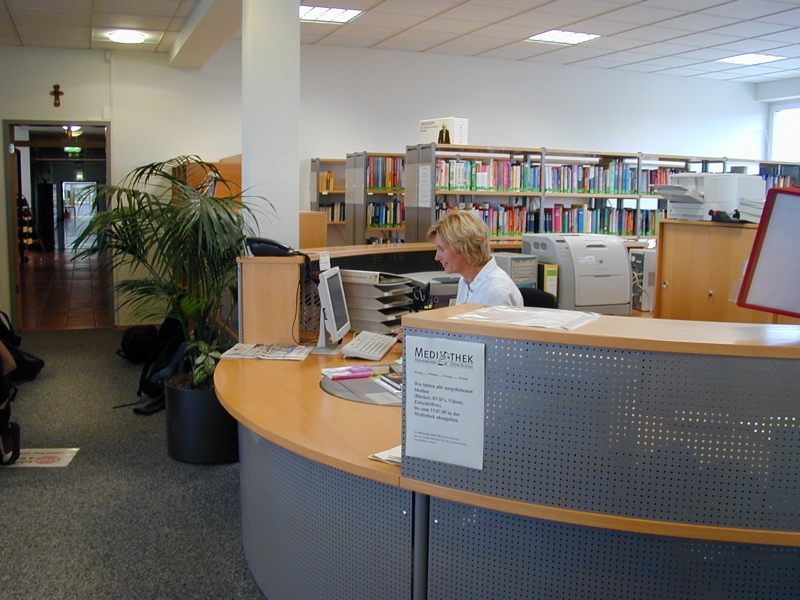 die Mediothek der Freiherr-vom-Stein-Schule verfügt über 10 moderne Computer-Arbeitsplätze und bietet umfangreiche Recherchemöglichkeiten im Internet; an zwei Computern kann auf aktuelle CD-Rom-Lexika (Britannica, Brockhaus, Kindlers, etc.) zugegriffen werden.